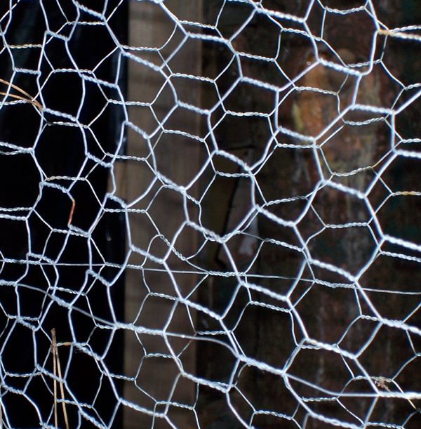 Chicken wire